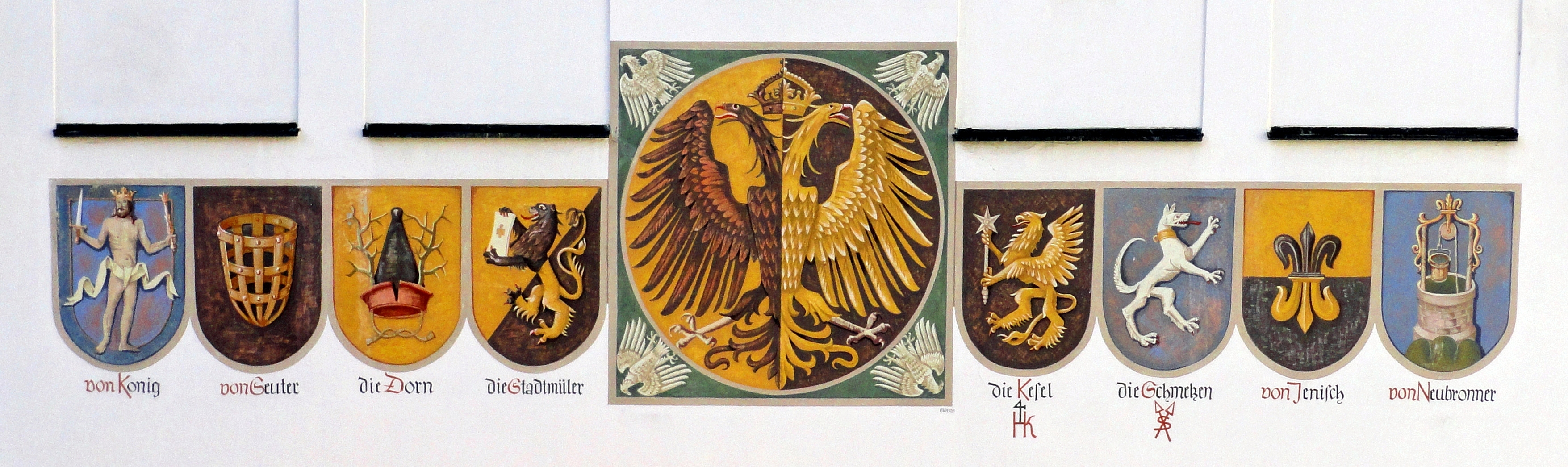 Patrizierwappen auf dem Kemptener Rathaus